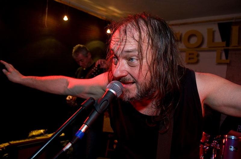 Ladislav Jakl